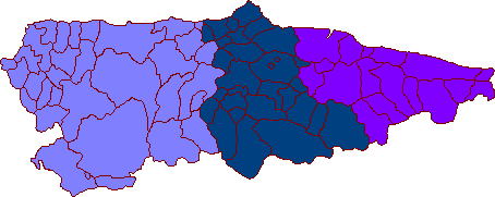 Mapa de las circunscripciones electorales de Asturias